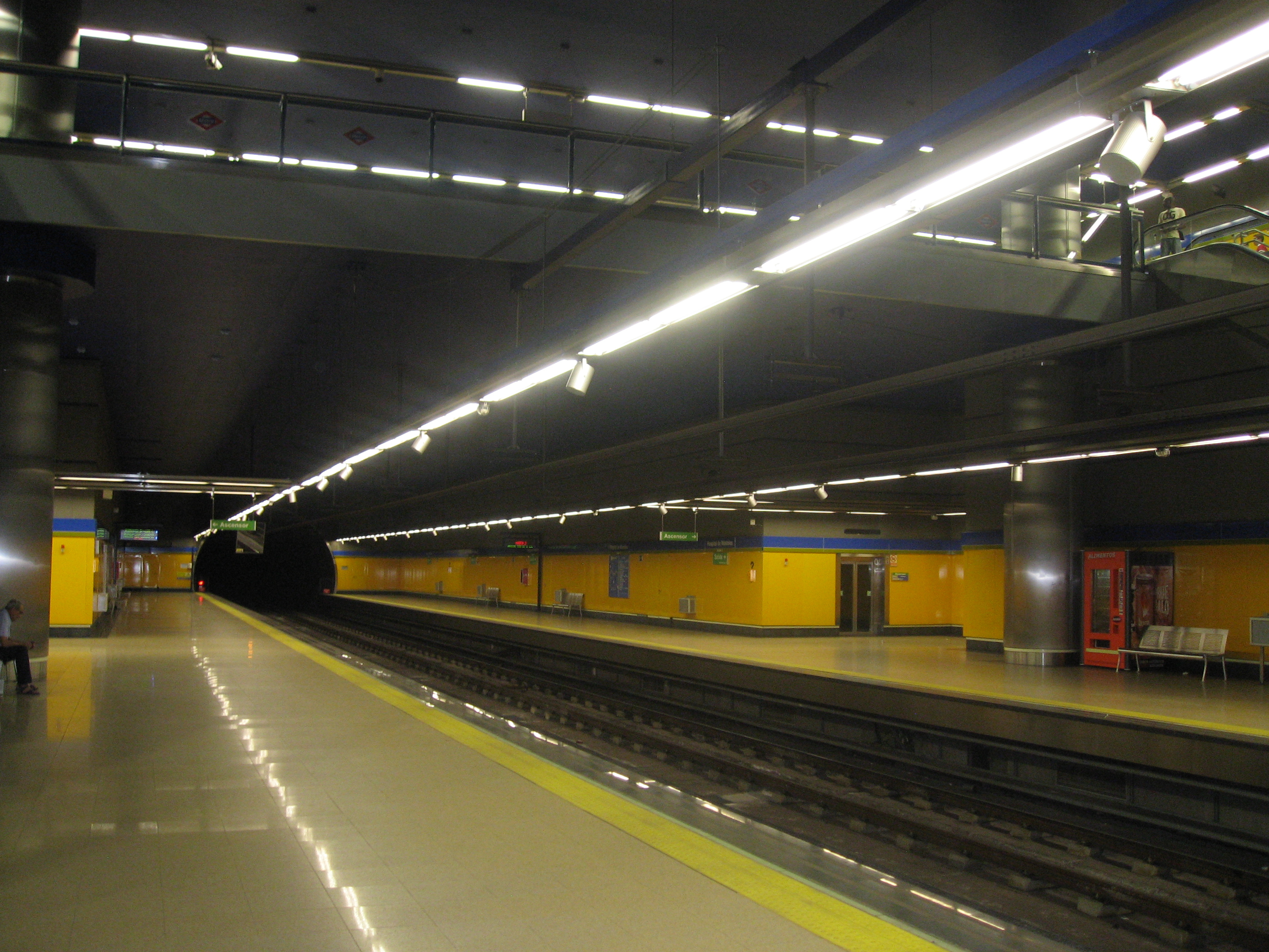 Vista de los andenes de la estación de Hospital de Móstoles